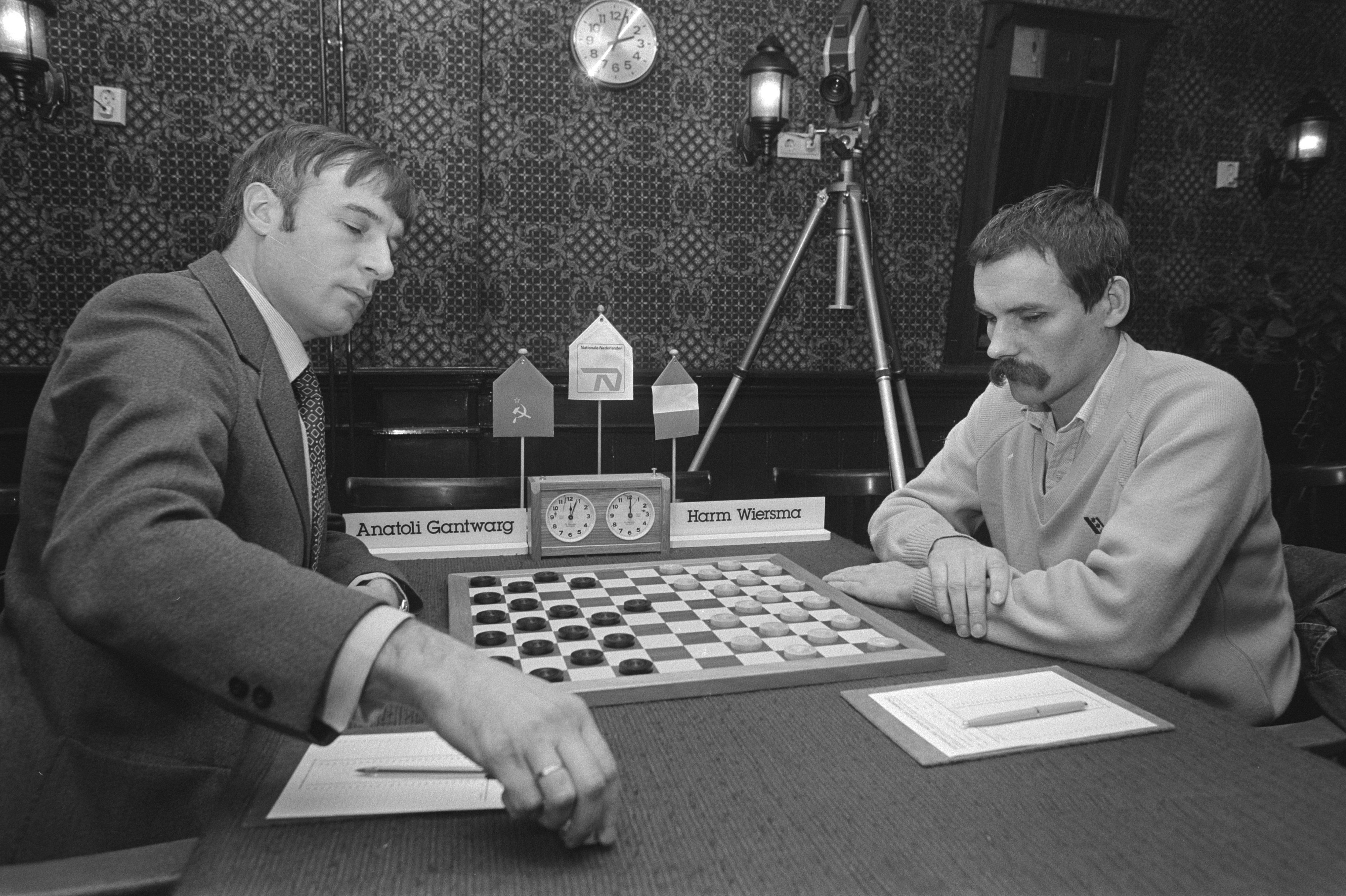 Gantwarg (links) en Wiersma in aktie